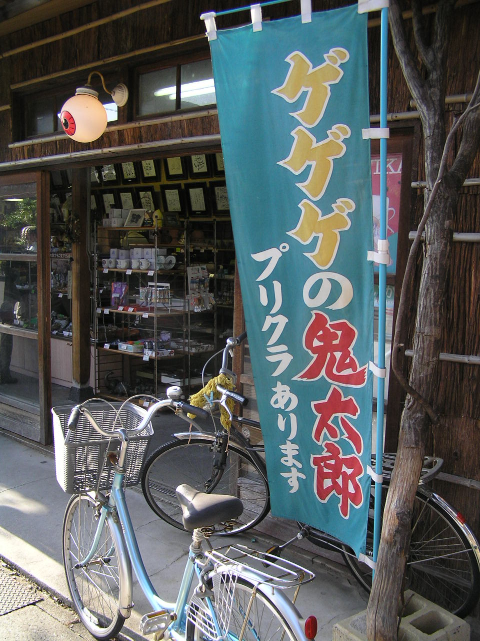 境港水木ロード ～photo by Autumn Snake 【おぉたむすねィく探検隊】